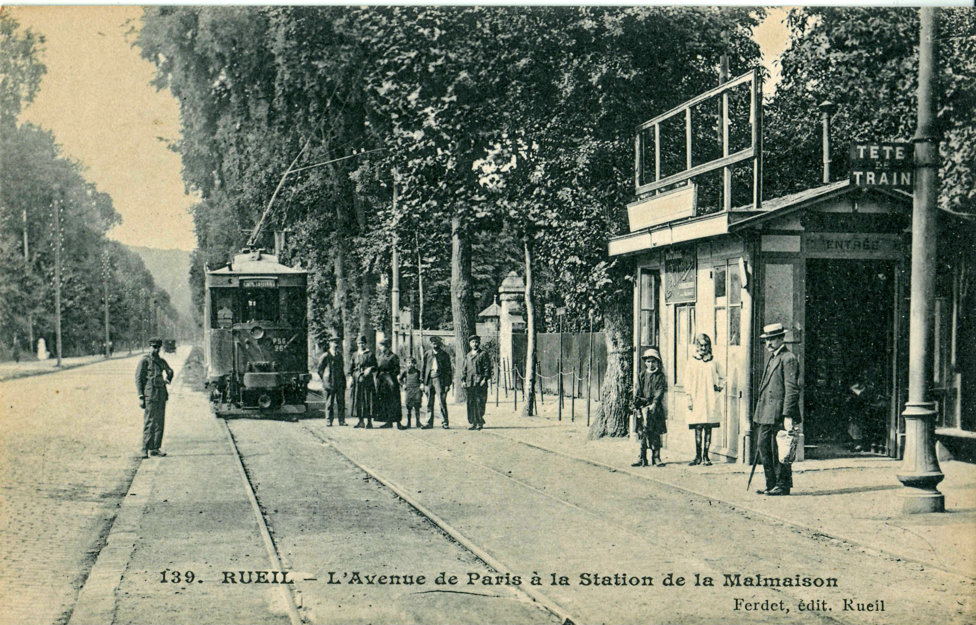 Carte postale ancienne éditée par Ferdet à Rueil :RUEIL - L'Avenue de Paris à la station de la Malmaison.